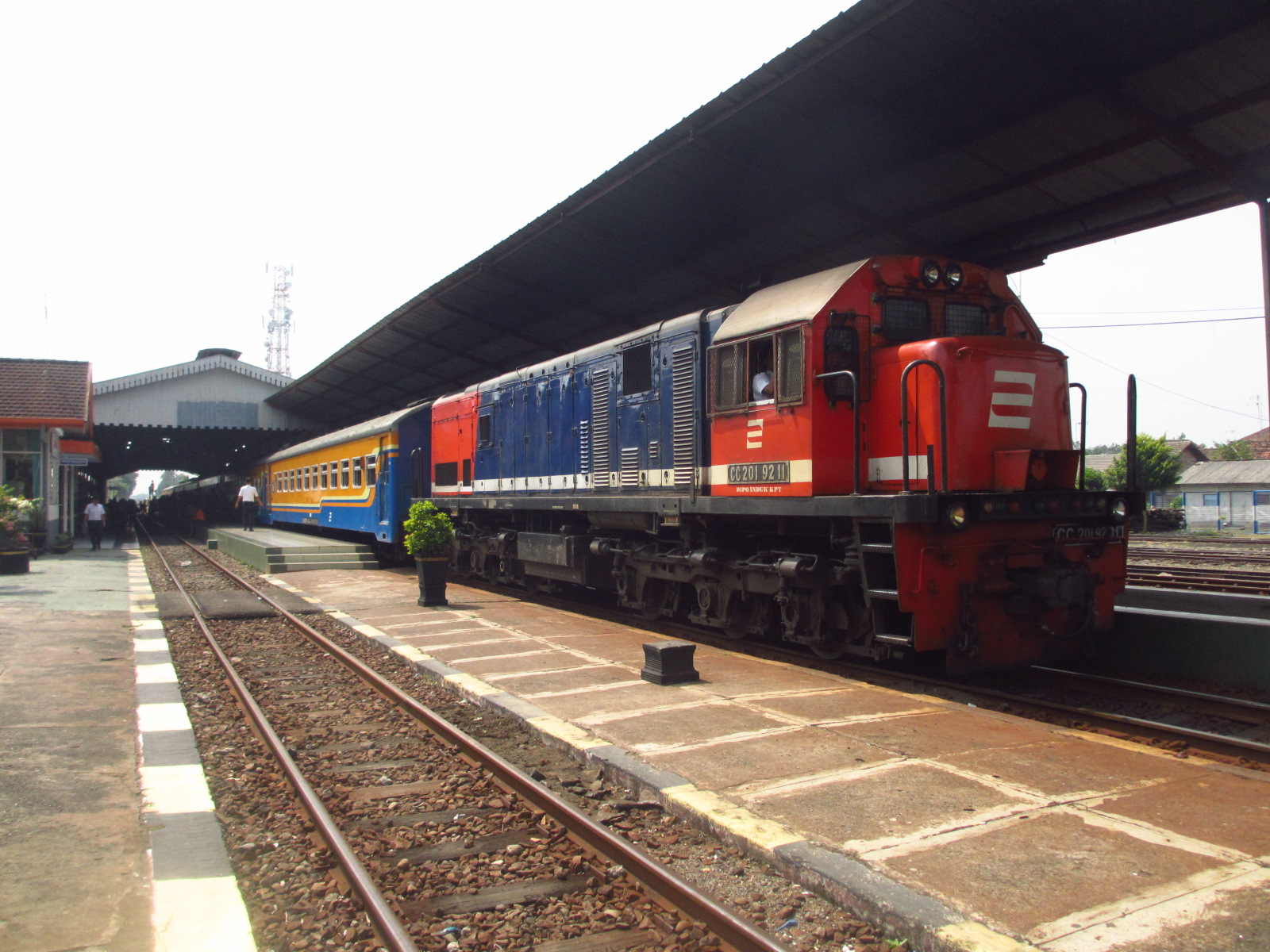 Kereta api Rapih Dhoho saat singgah di Stasiun Jombang.